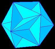 grand dodécaèdre capture d'un des applets LiveGraphics3D du site Autorisation après demande à l'auteur : "Concernant les images de solides, je considère qu'il n'y a pas de "droits" sur des sujets mathématiques. J'ai eu l'occasion d'utiliser des travaux réalisés par d'autres ; en général cela ne pose pas de problème dans la mesure où l'on demande l'autorisation et cite ses sources ("to give credit" comme disent les anglophones). Vous pouvez donc utiliser sans problème les images de mon site." Merci à lui.